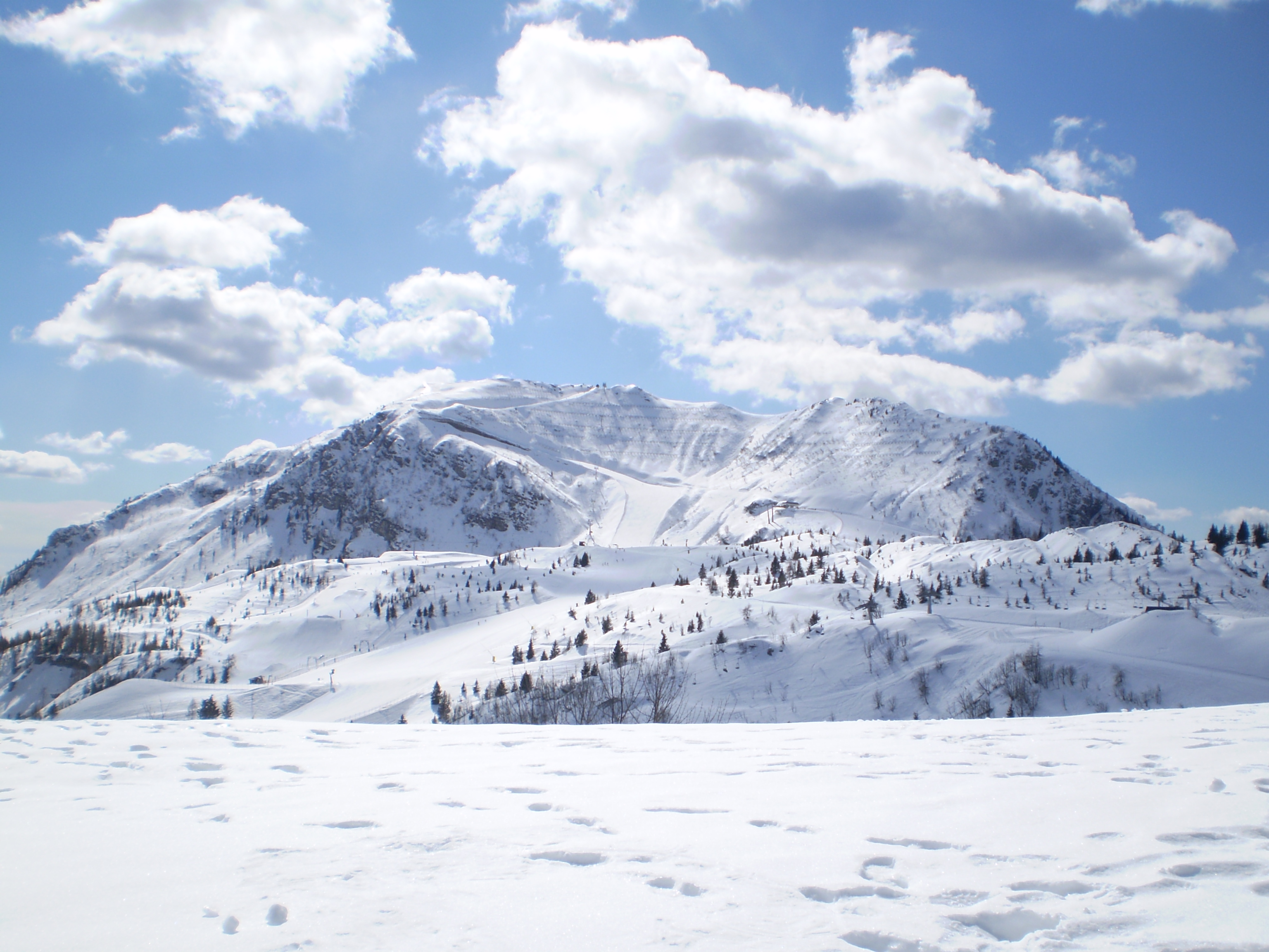 il monte Tamai (1970 m), in Carnia (provincia di Udine)